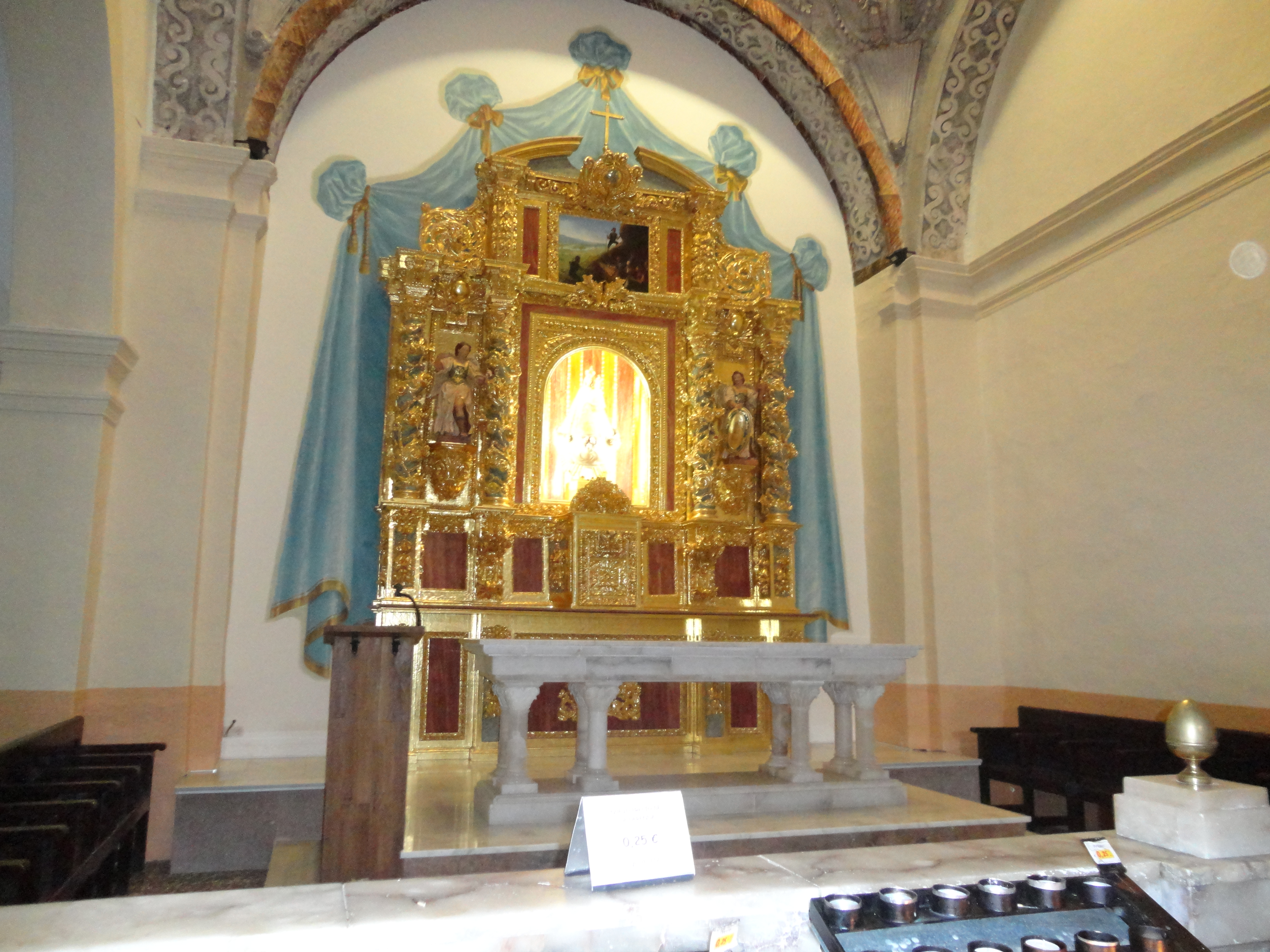 Altar de la Iglesia de la Virgen de Dos Aguas en Nonaspe